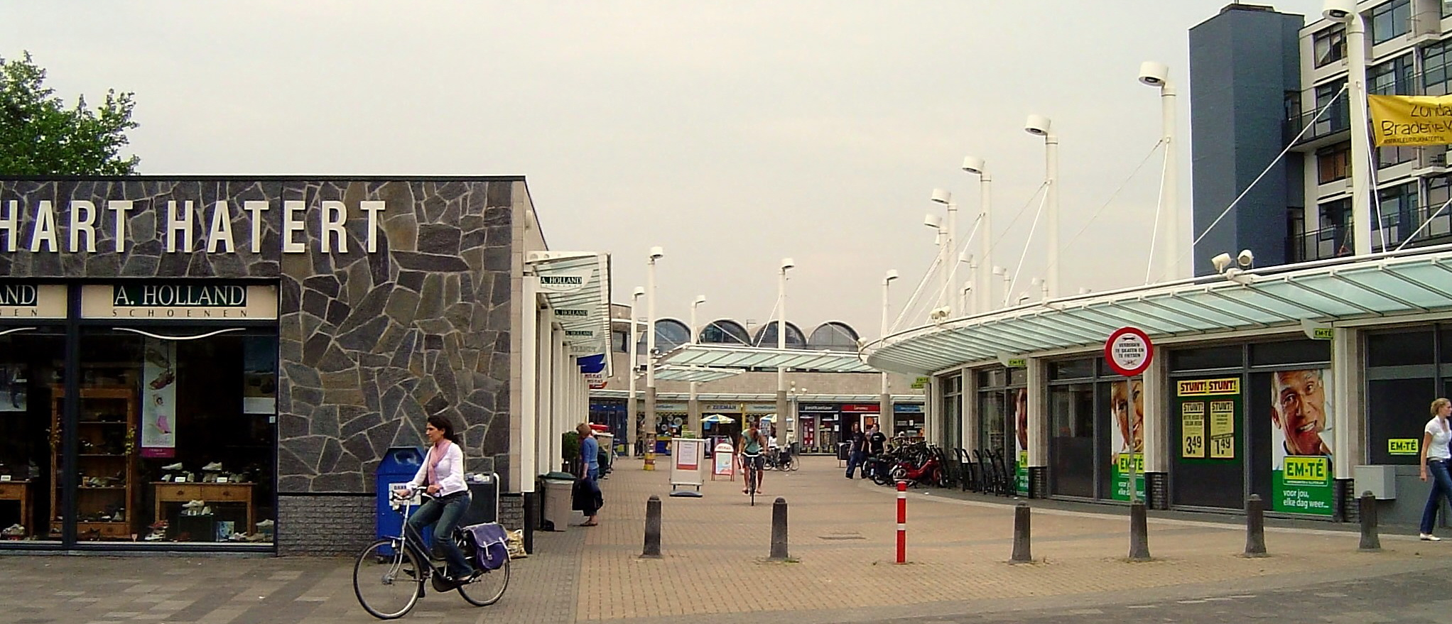 Le nouveau coeur de Hatert